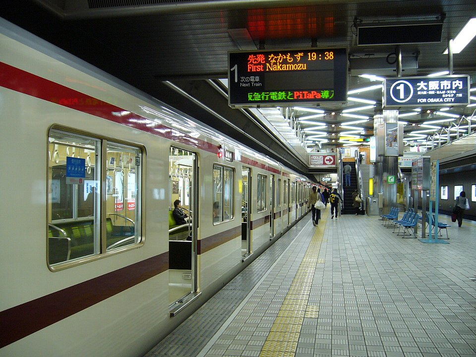 北急千里中央駅ホーム 8000系が停車中2006年11月12日 Bakkai撮影